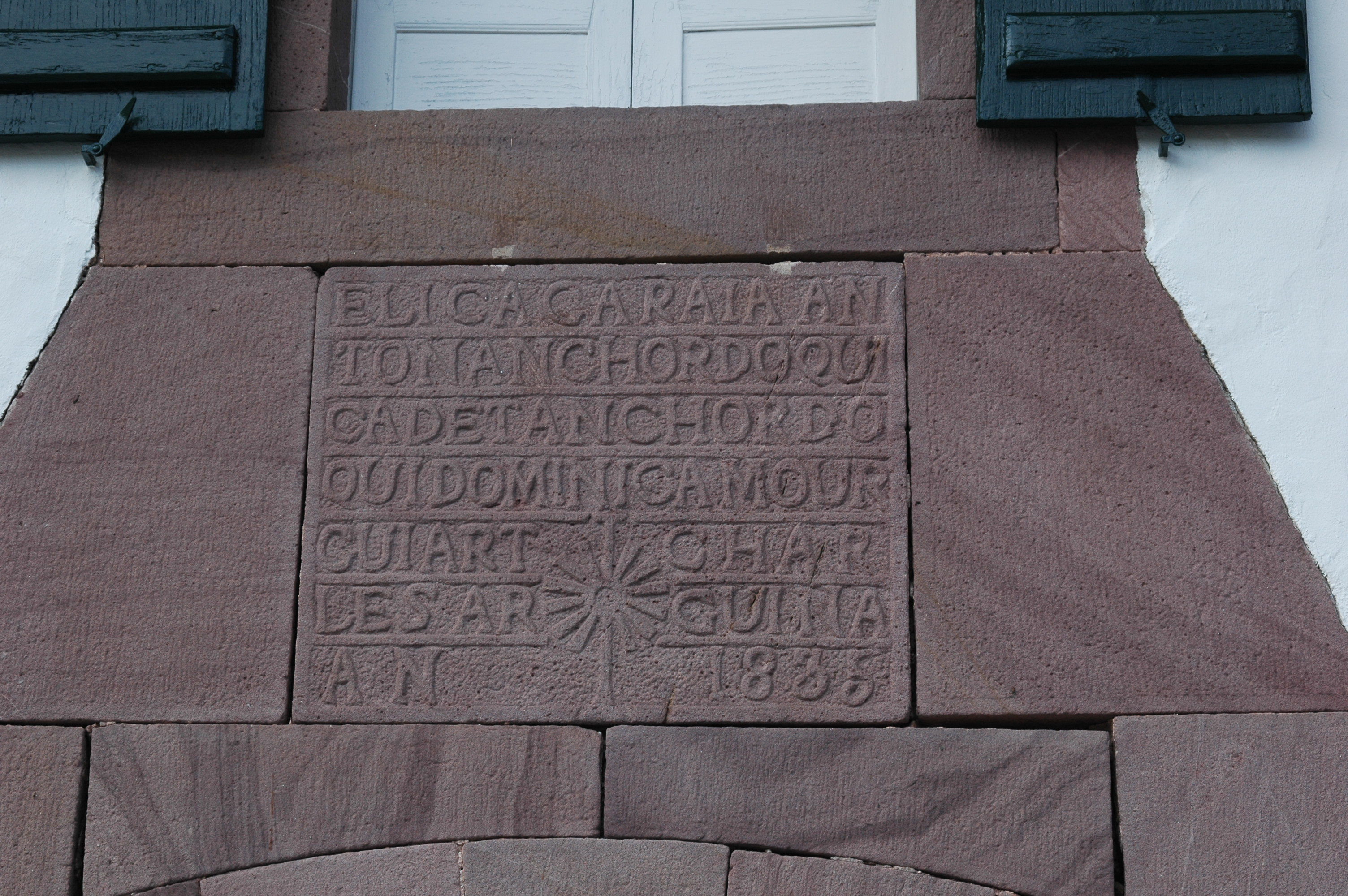 Bidarray, détail du fronton d'une maison. Photo prise le 03/08/06 par Harrieta171